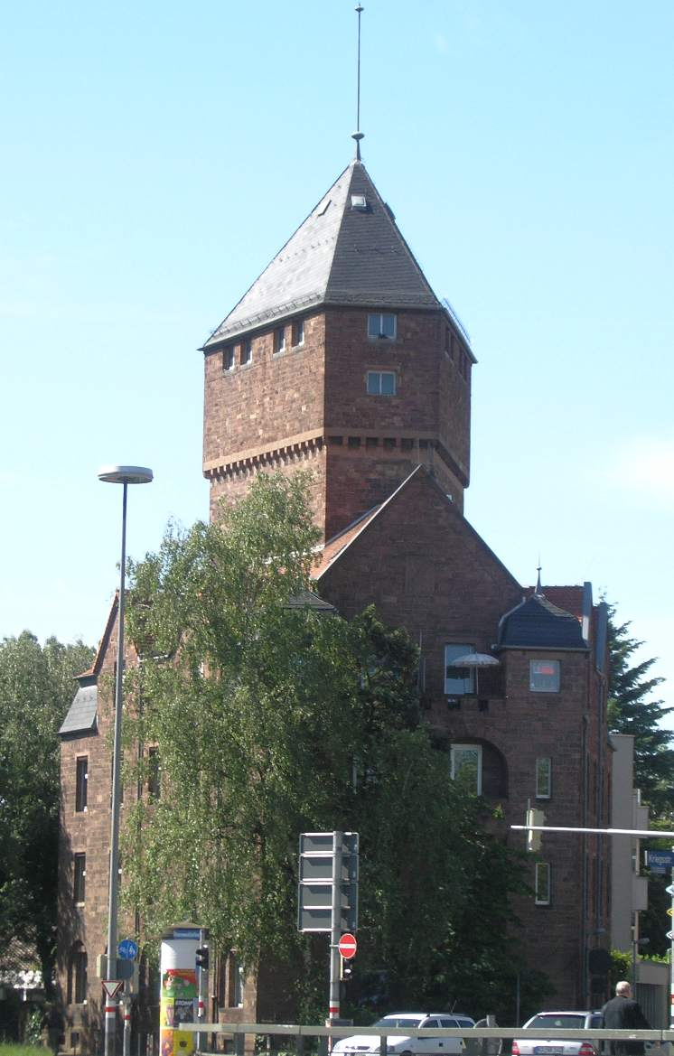 Wohnhaus mit Wassrturm der Kunstwollfabrik Vogel & Schnurmann in Karlsruhe-Grünwinkel, 1907 von Adolf Singrün